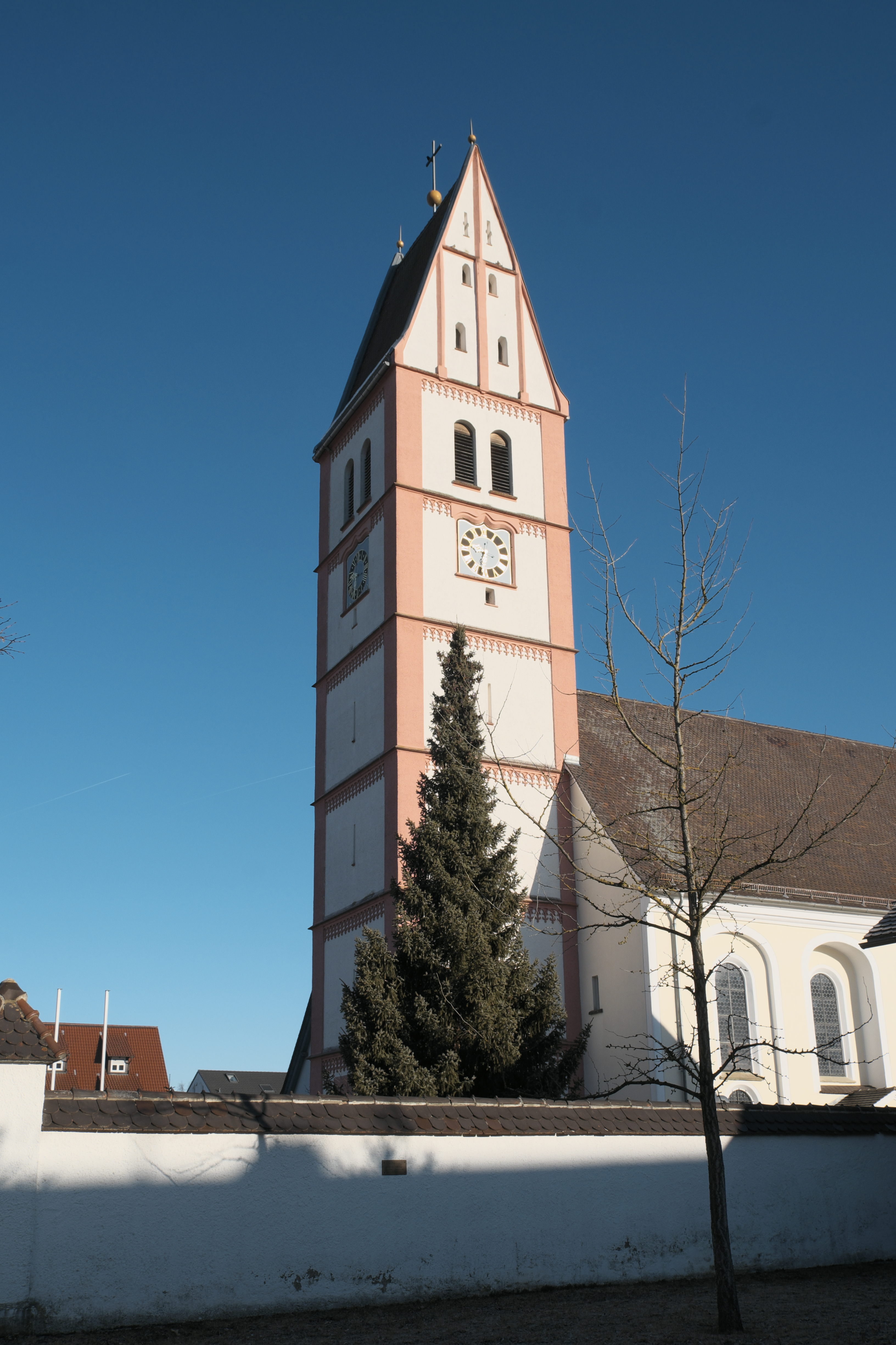 Katholische Pfarrkirche St. Konrad in Berkheim im Landkreis Biberach (Baden-Württemberg/Deutschland)